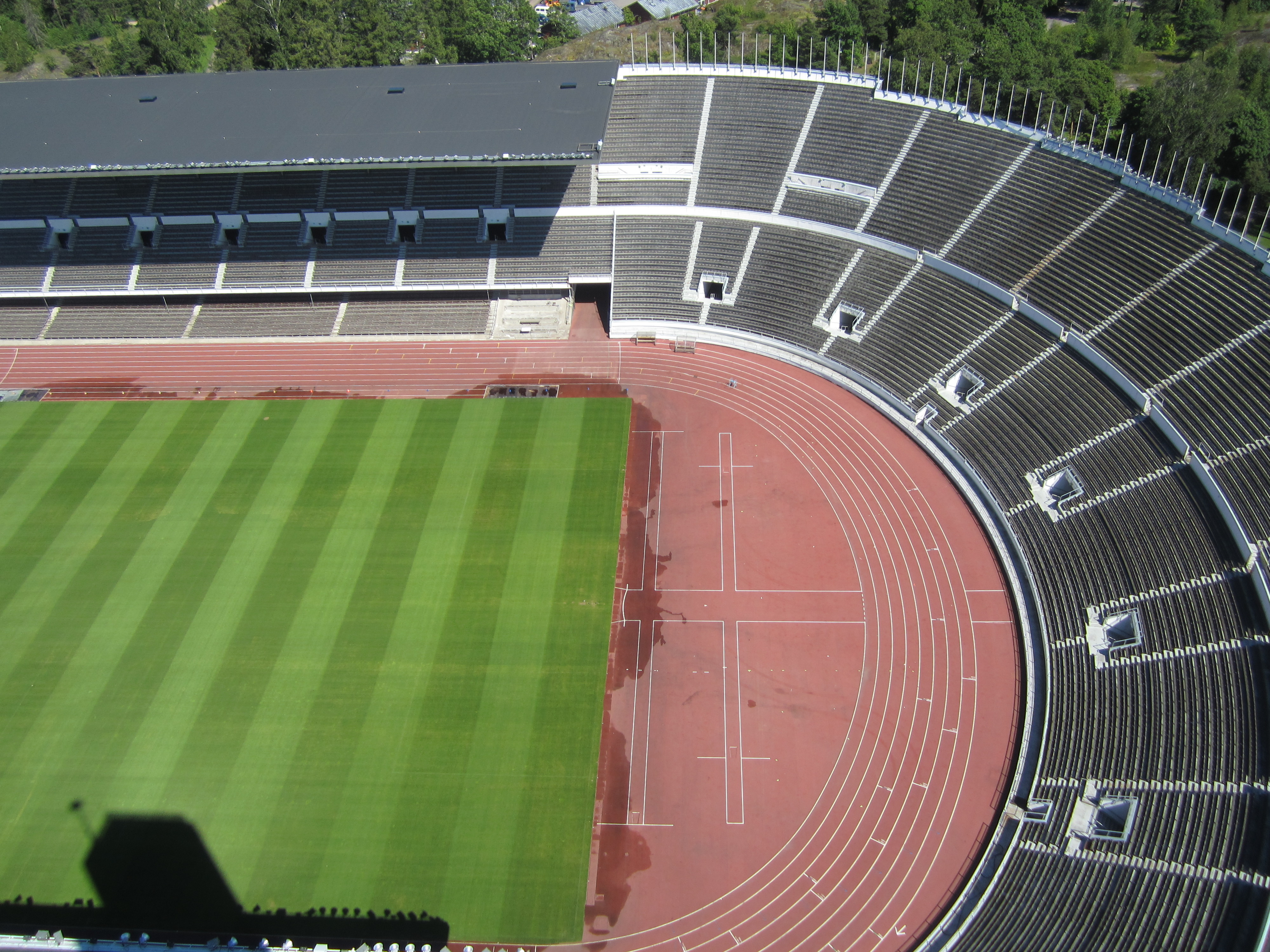 Helsingin olympiastadion näkymä tornista